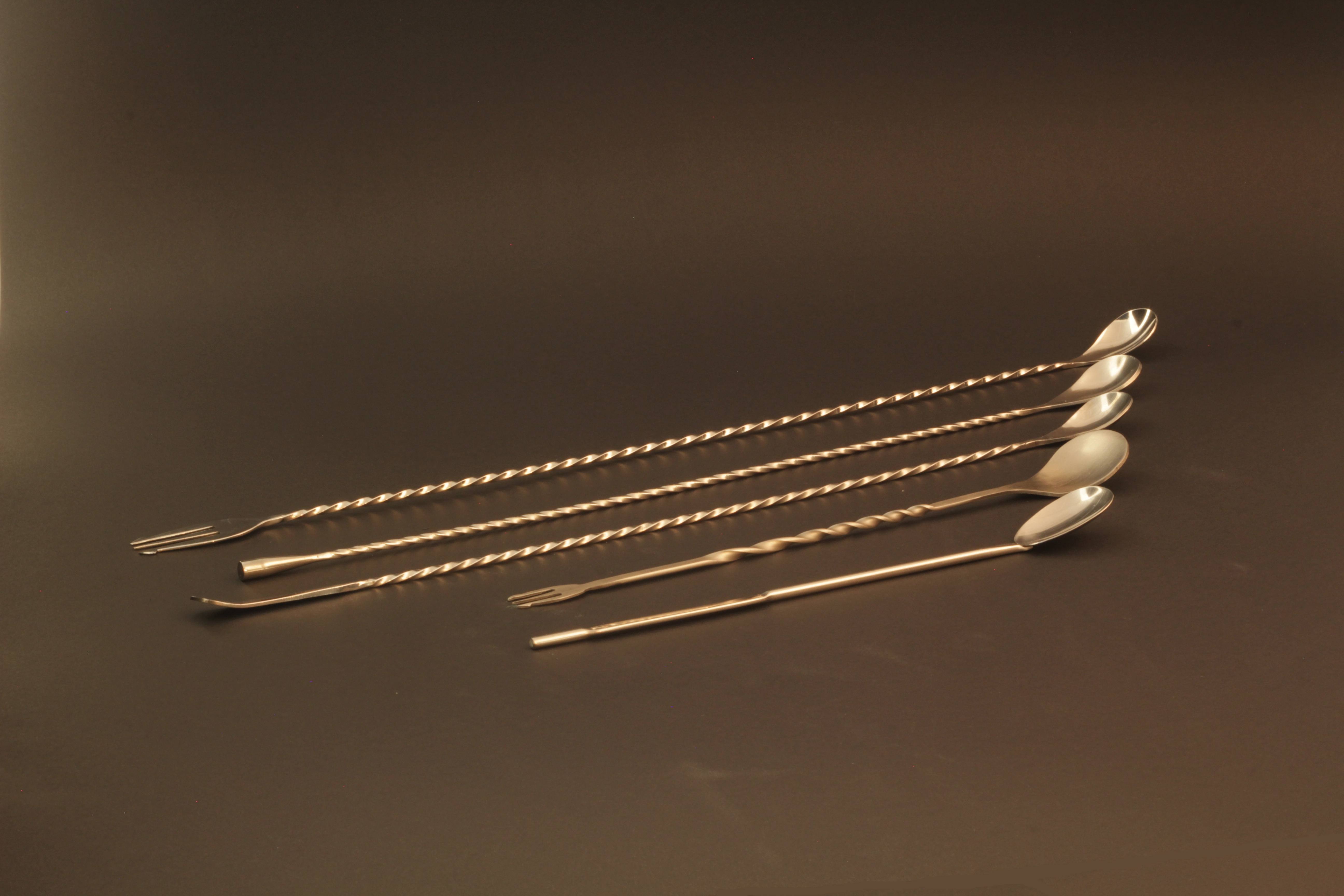 Barlöffel